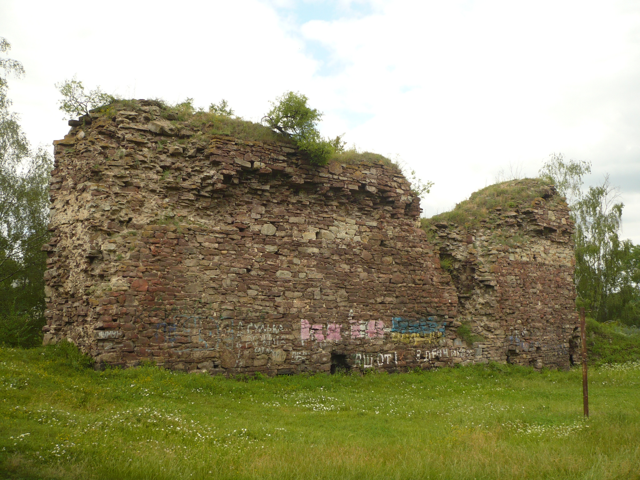 Buczacz. Zamek